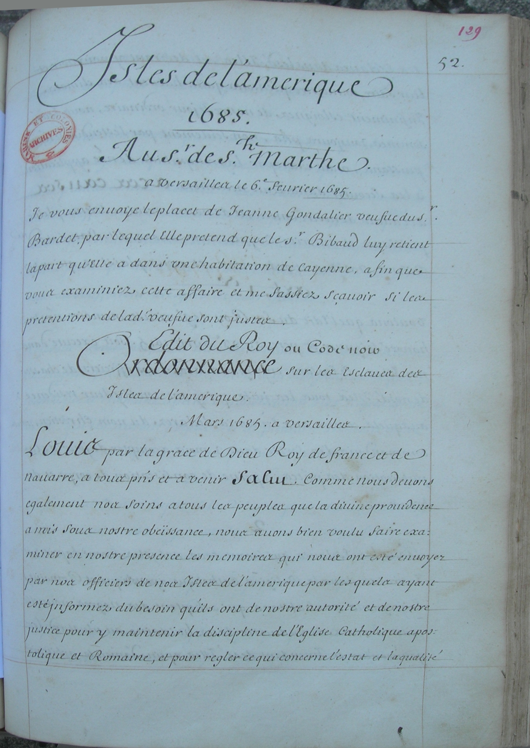 Première page de la copie manuscrite de l'Ordonnance / Edit du Roy ou Code noir sur les Esclaves des Isles de l'amérique, Mars 1685, a versailles. Cet Ordonnance/Edit/Code Noir se trouve sous l'appellation "Code Noir", dans le volume des Ordres du roi pour les îles de l'Amérique française, p. 52. Document non consultable en ligne à la date du 18 janvier 2016, cote ANOM B11 folio 129.